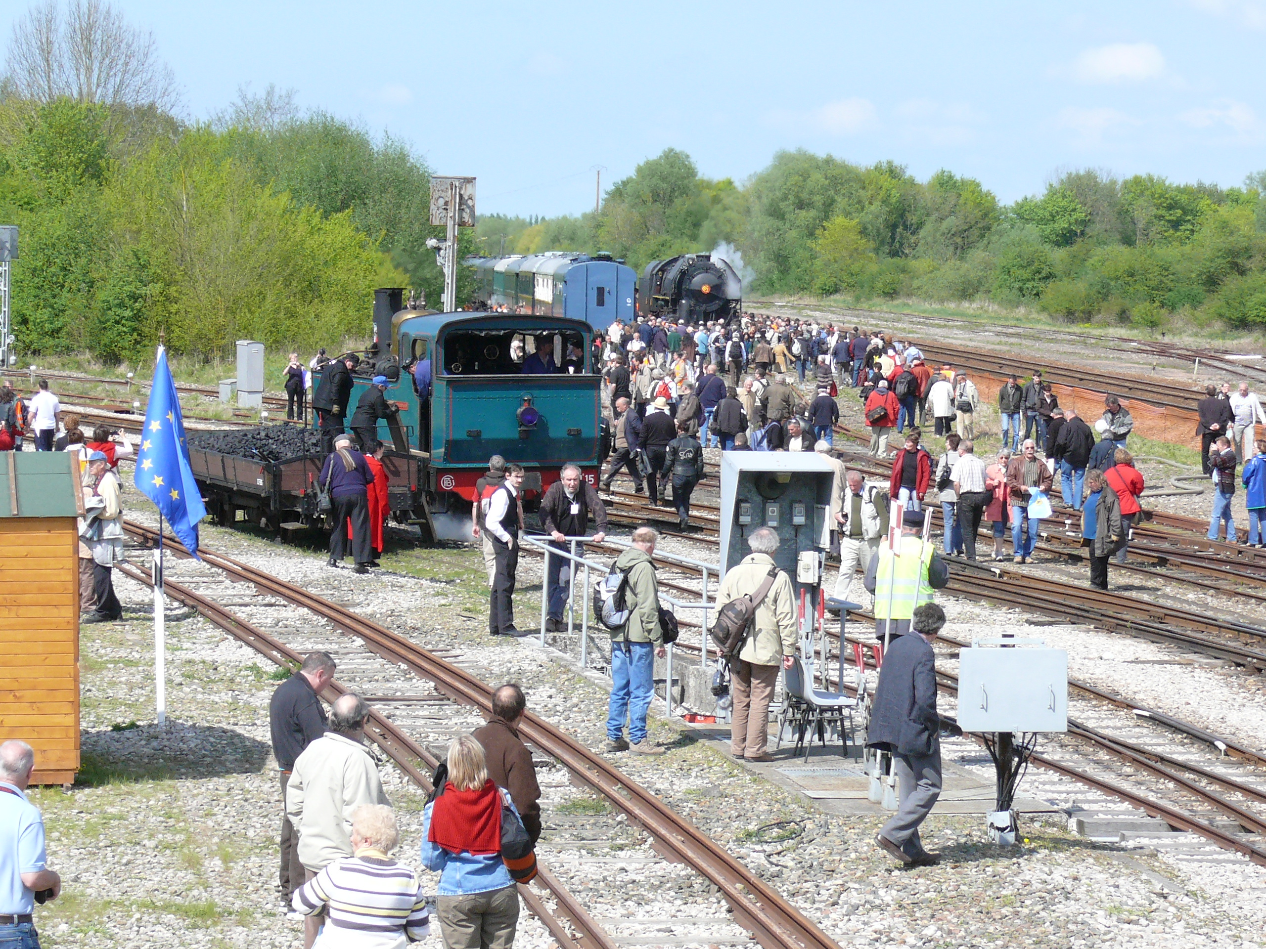 Fête de la vapeur 2009 du Chemin de fer de la baie de Somme : la la 130T Haine-Saint-Pierre N°15 à voie métrique à gauche, la 141R840 ex SNCF de l'association des Anciens et Amis de la Traction-Centre Val de Loire